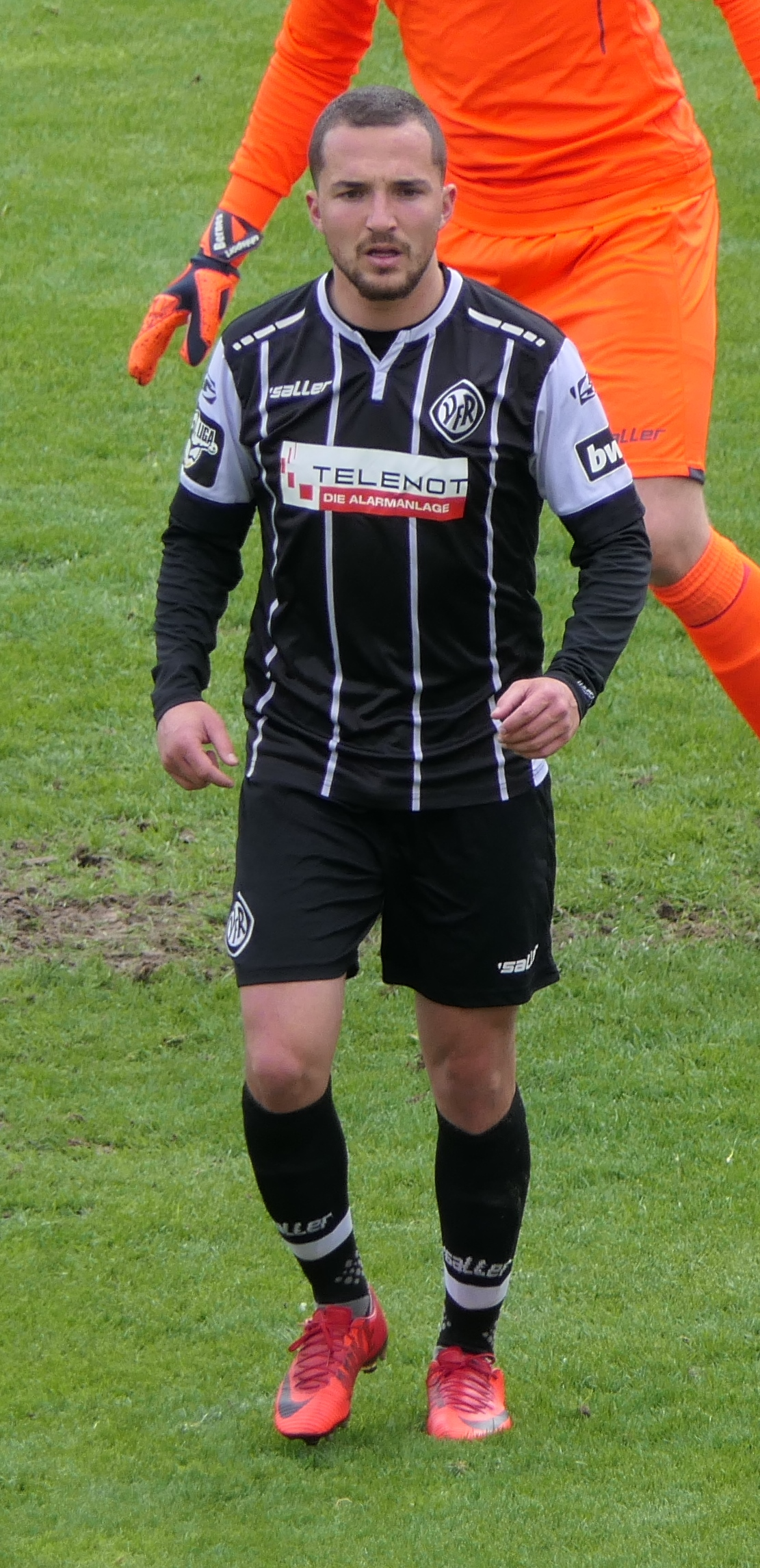 Der Fussballprofi Marvin Büyüksakarya im Trikot des VfR Aalen beim Heimspiel gegen Eintracht Braunschweig am 05.05.2019.